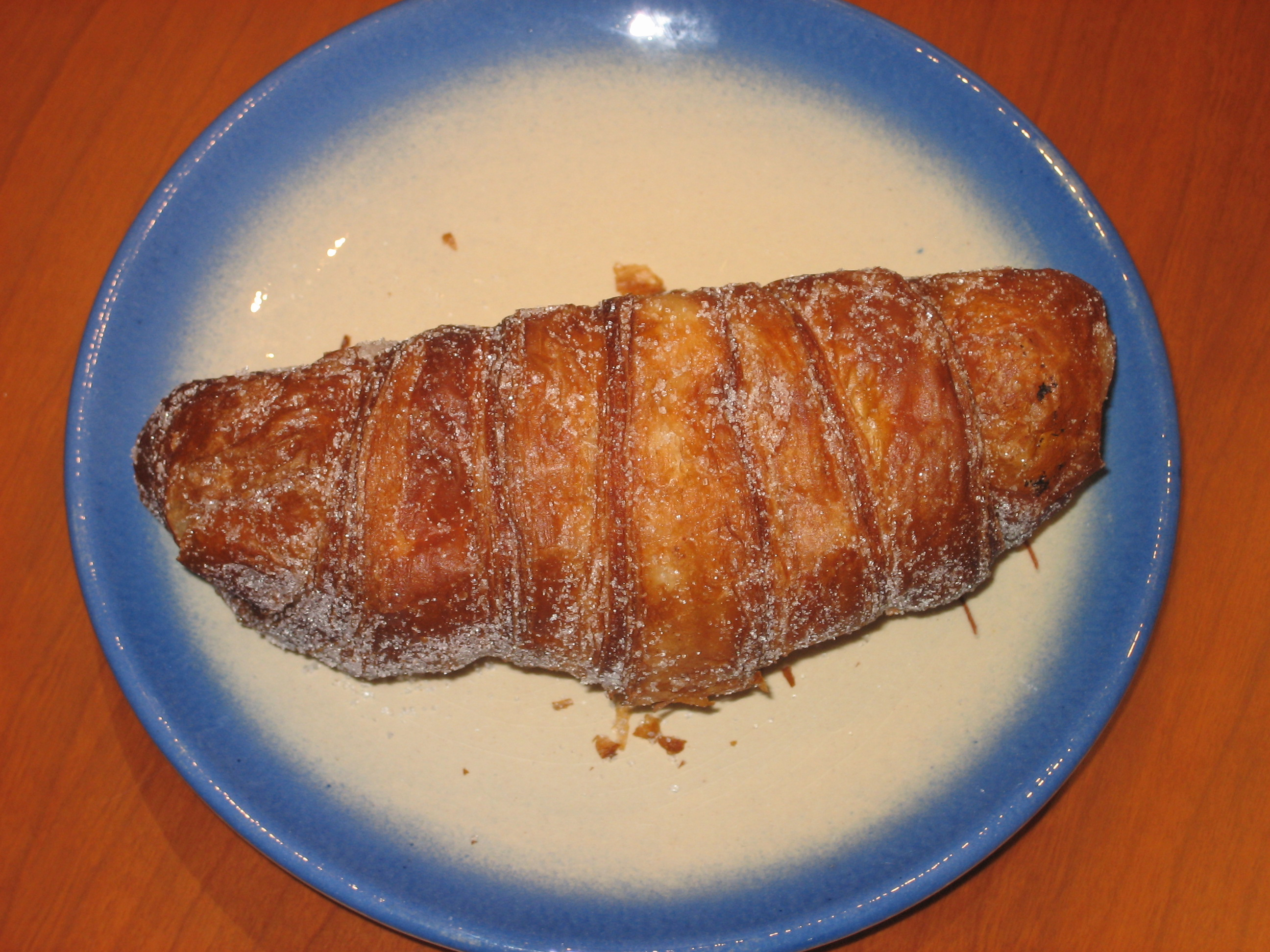 pasta dolça